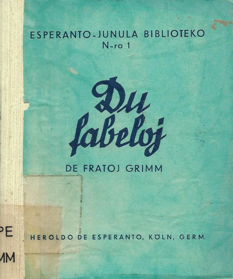 librokovrilo de libro "Du Fabeloj", 1929